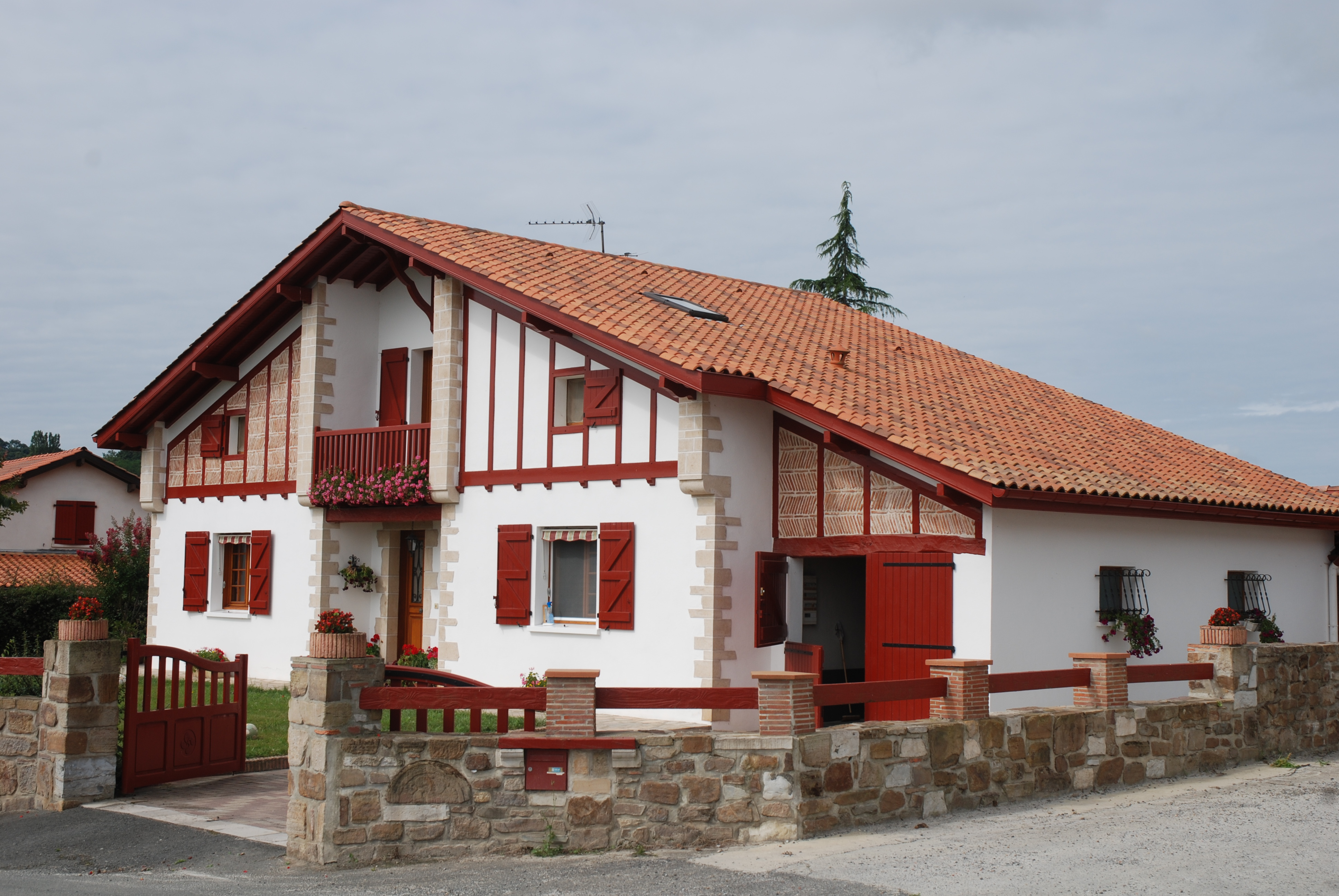 Maison dans le bourg d'Amorotz